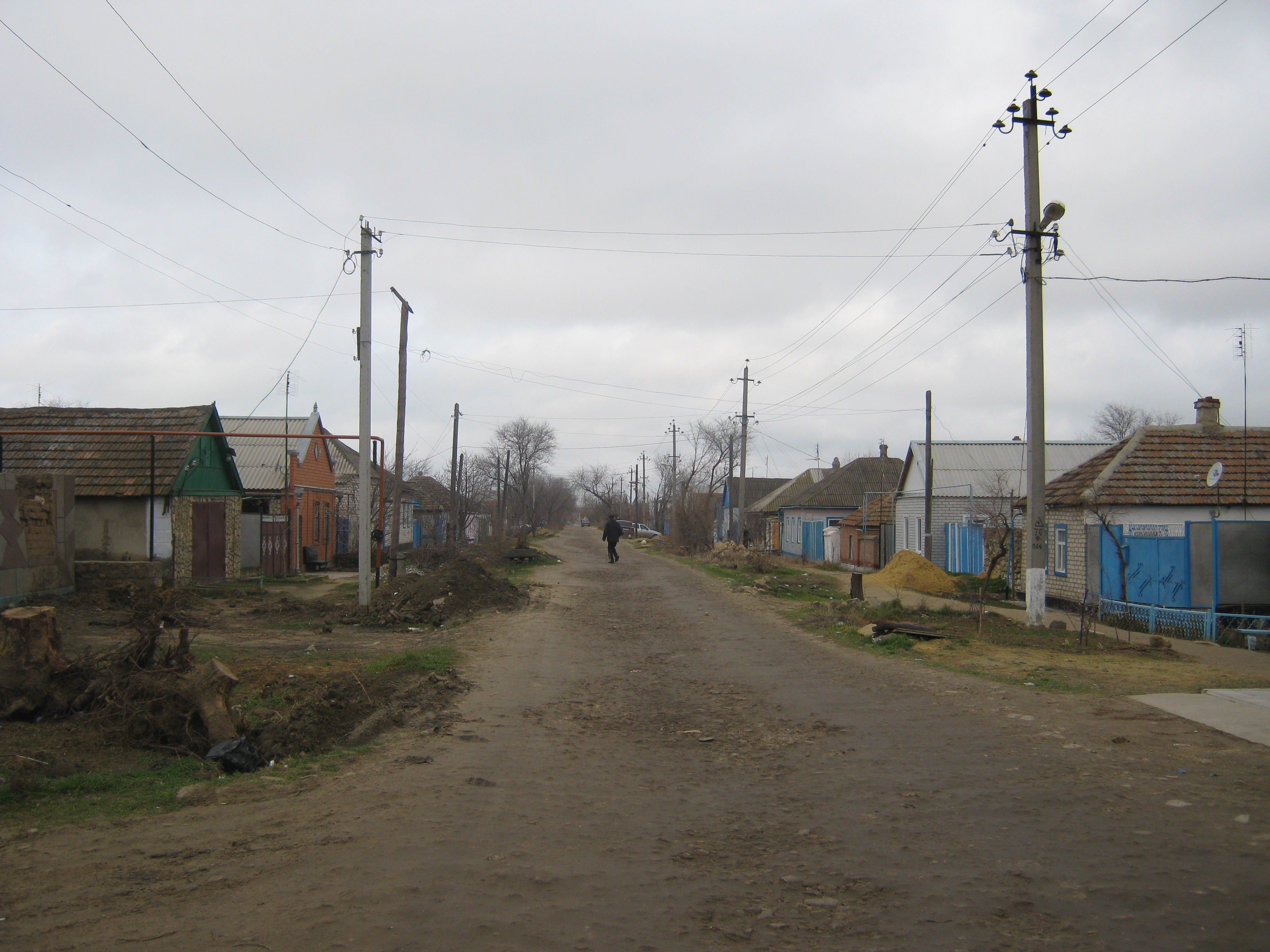 Улица Кавказская в Светлограде. Одна из типичных улиц города.